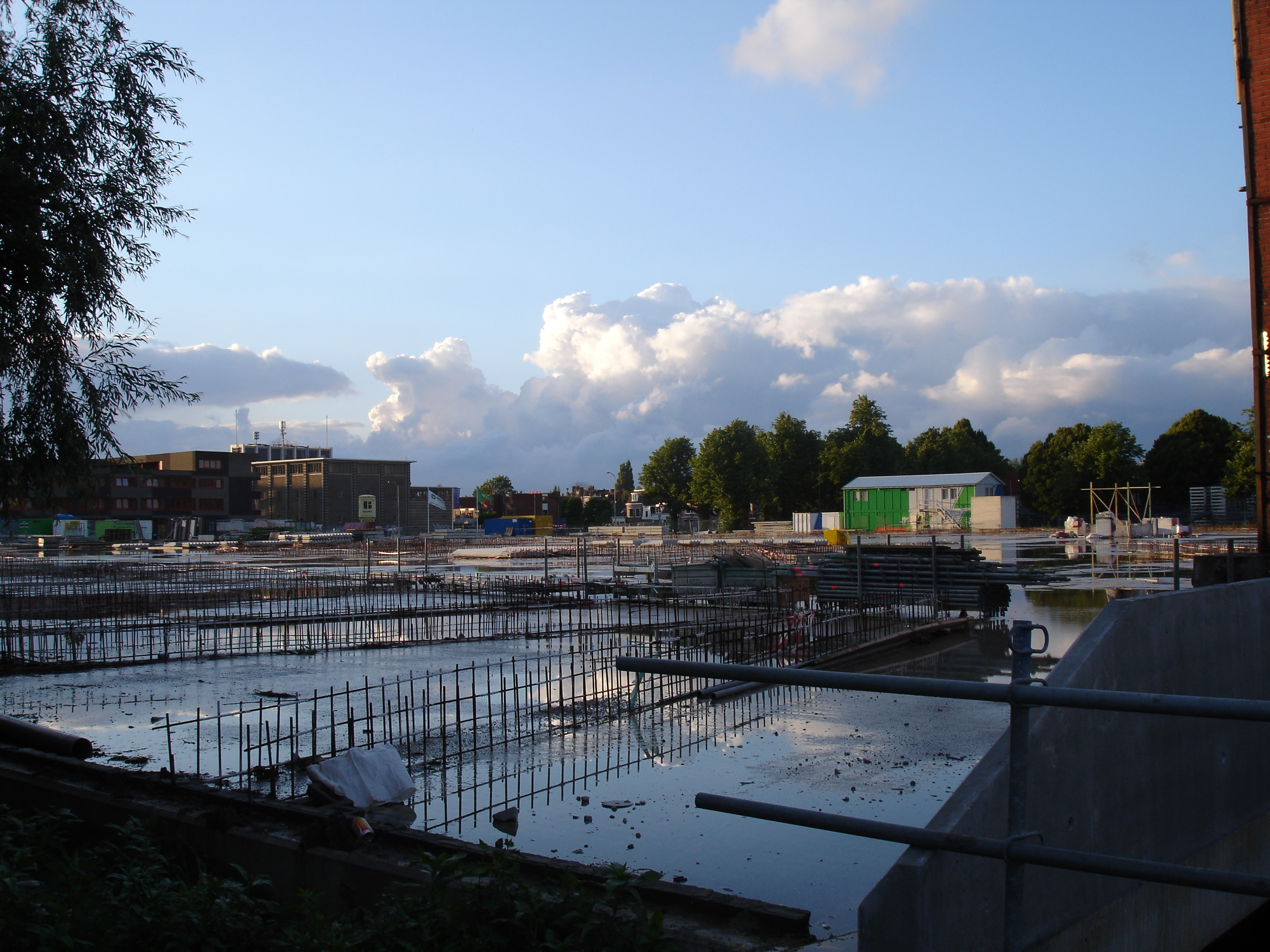 Bouwplaats Ciboga (2008)